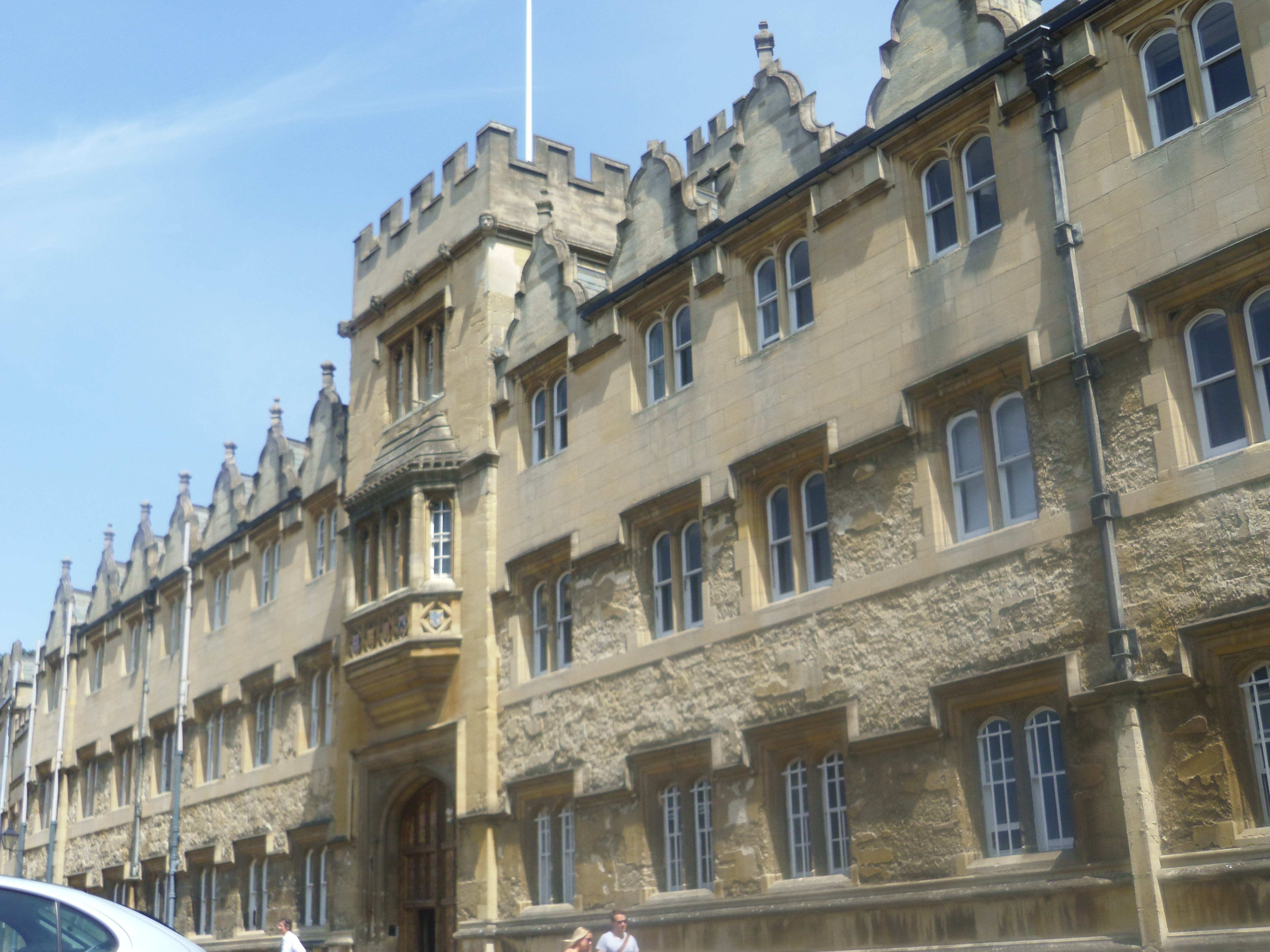 Brasenose College nel 2013